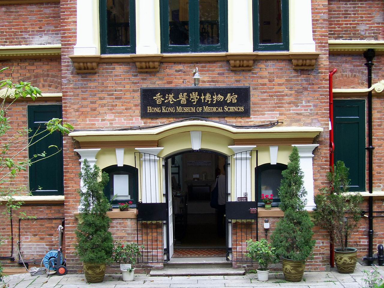 堅巷舊病理學院現時用作香港醫學博物館